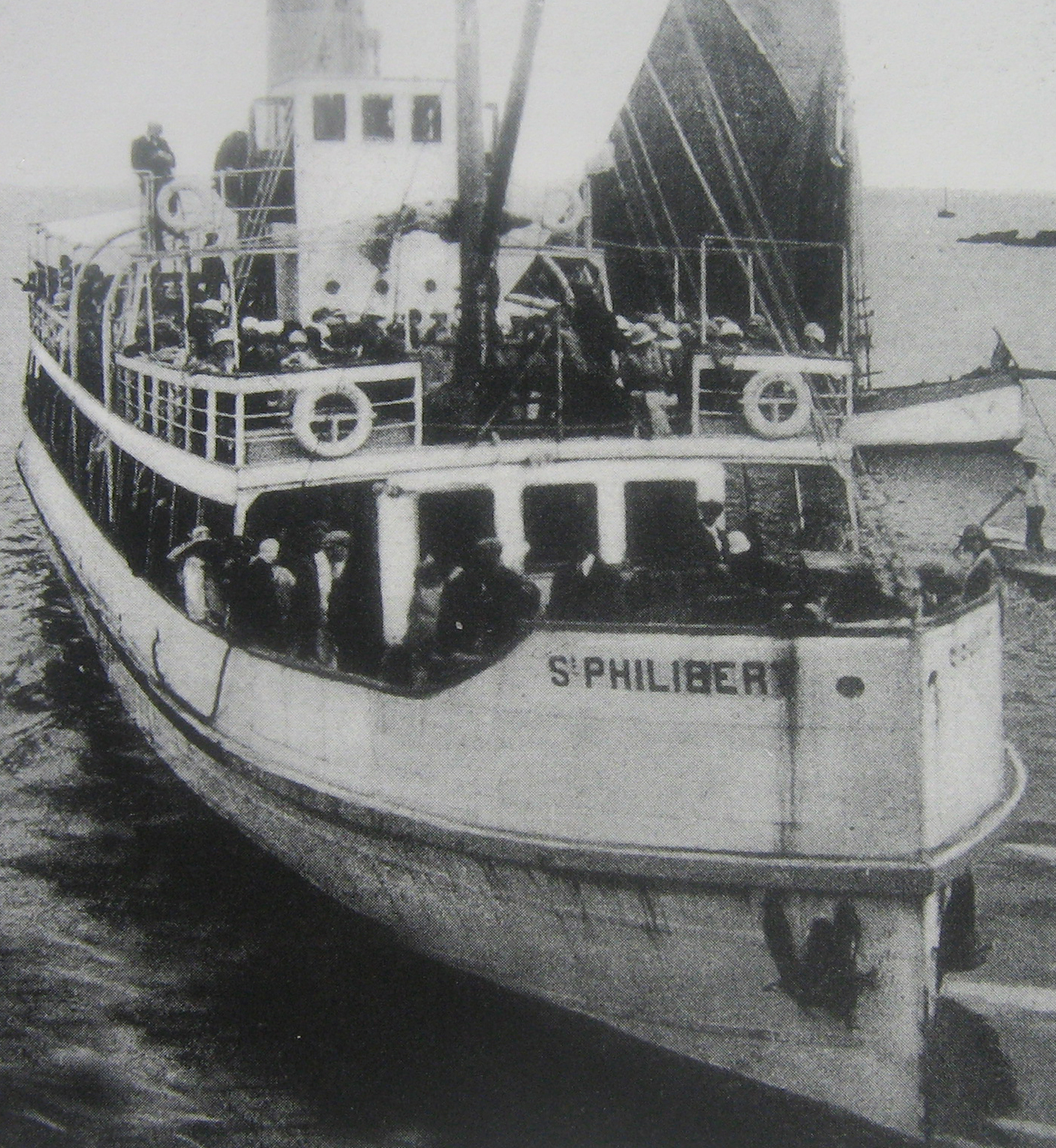 Saint-Philibert était bateau qui naviguait dans l’embouchure de la Loire